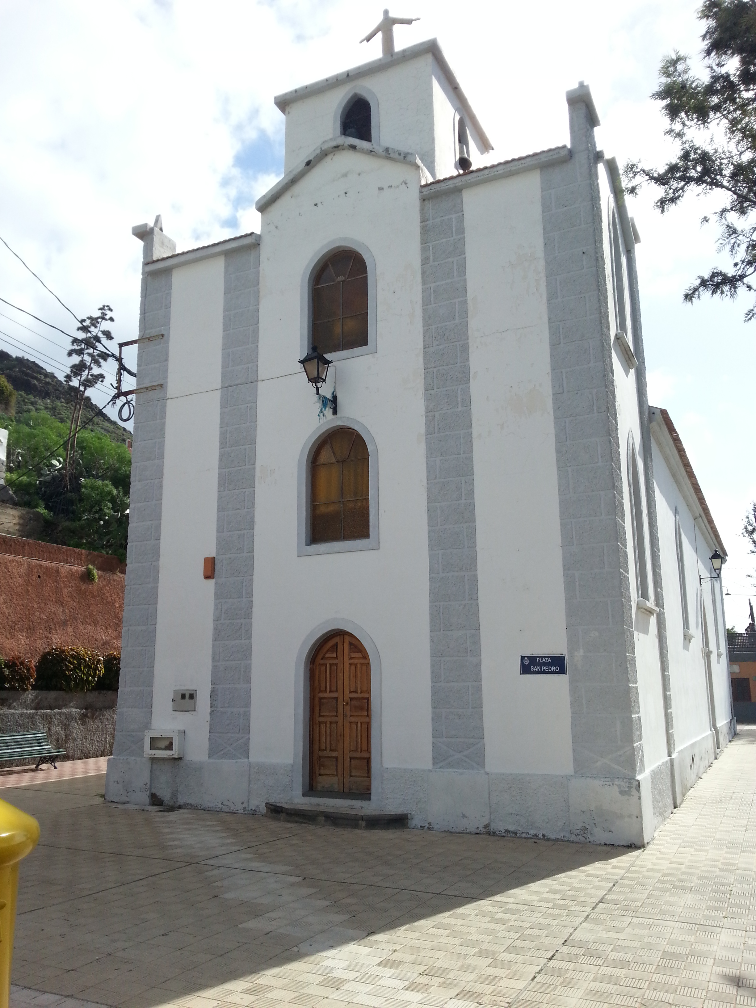 Iglesia de San Pedro. Igueste de San Andrés (Santa Cruz de Tenerife)